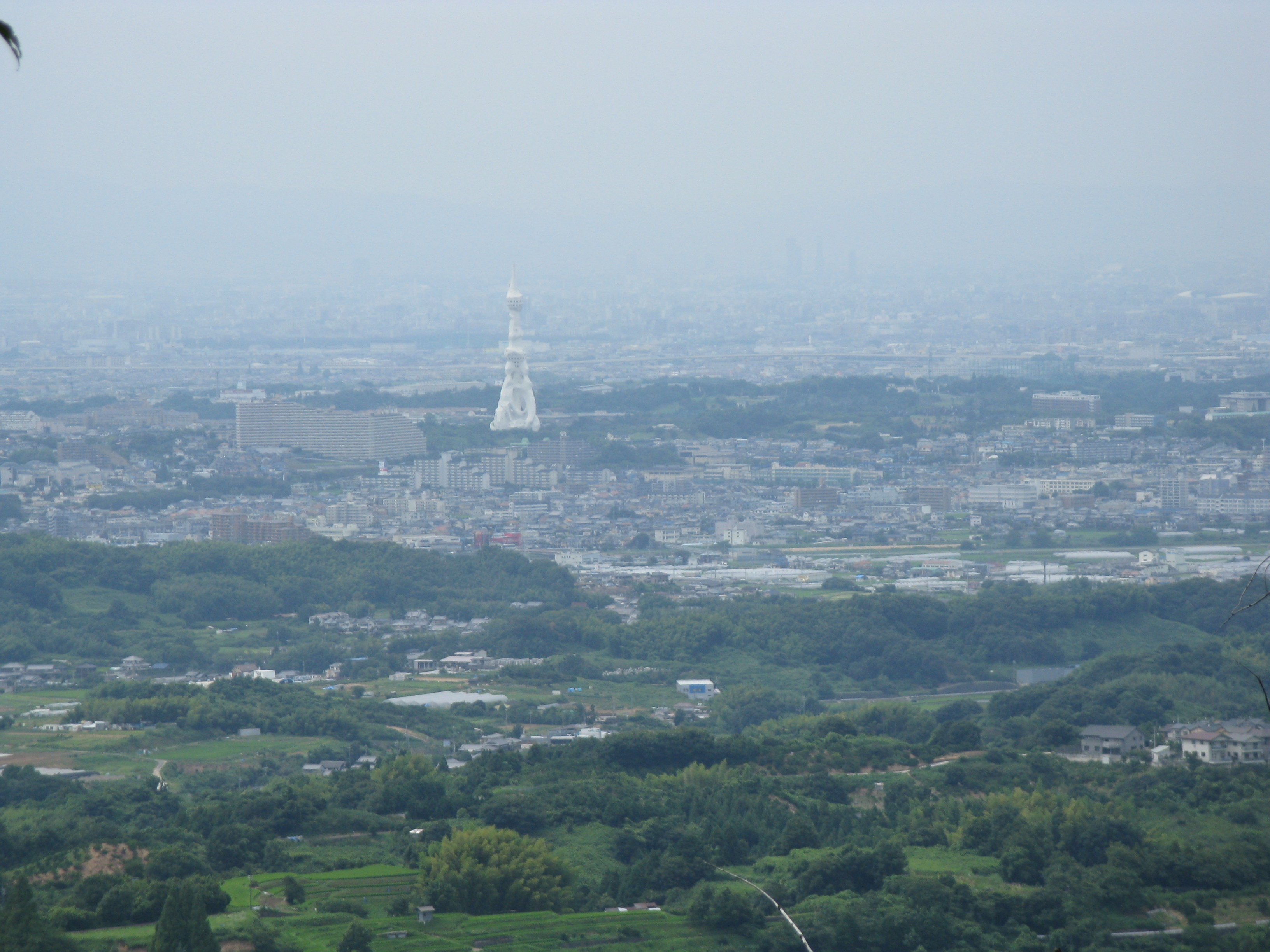 上赤坂城址よりの風景